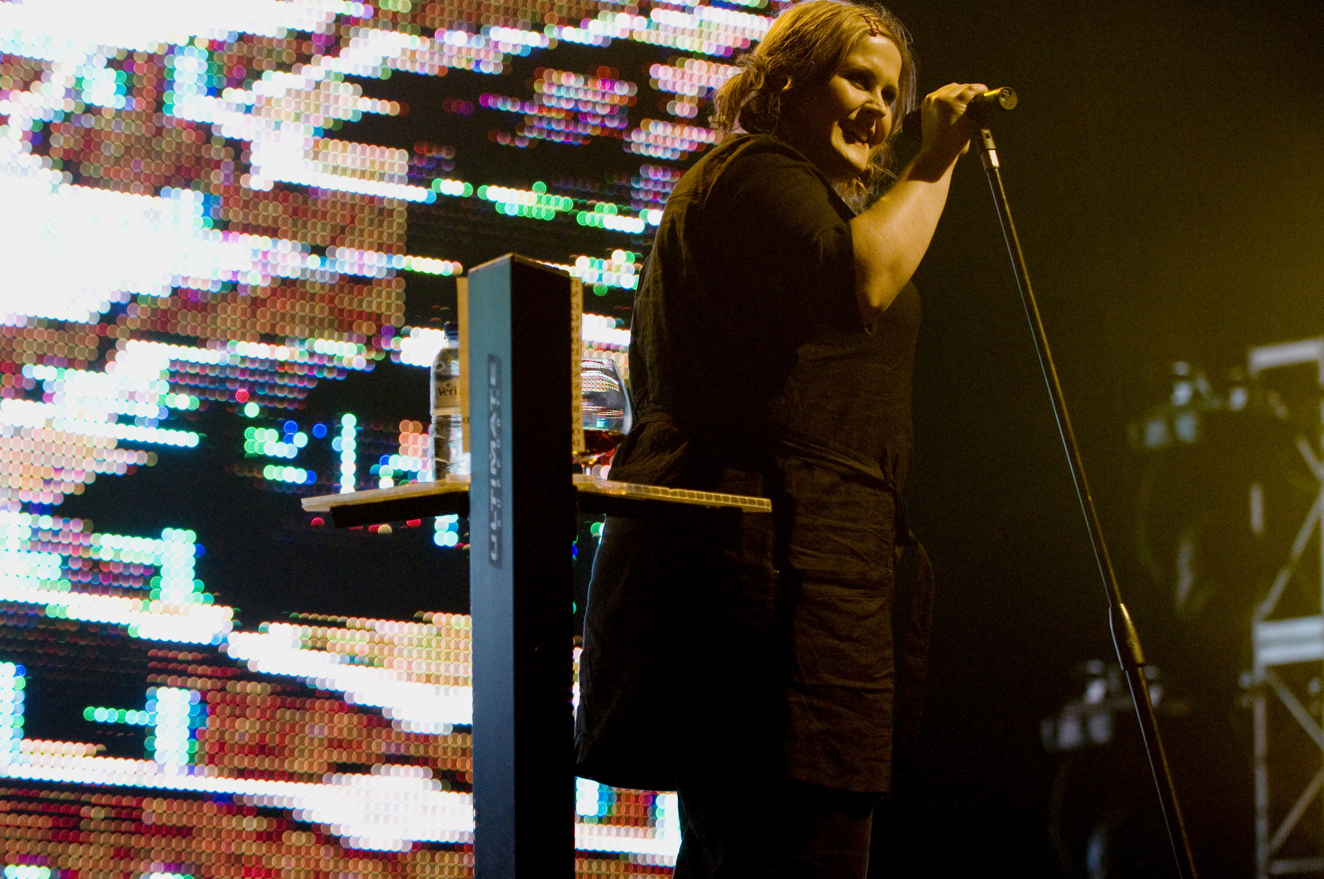 Yazoo (band)